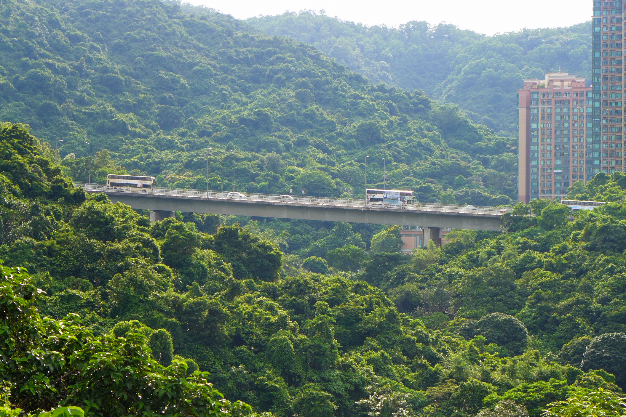 Liu To Bridge